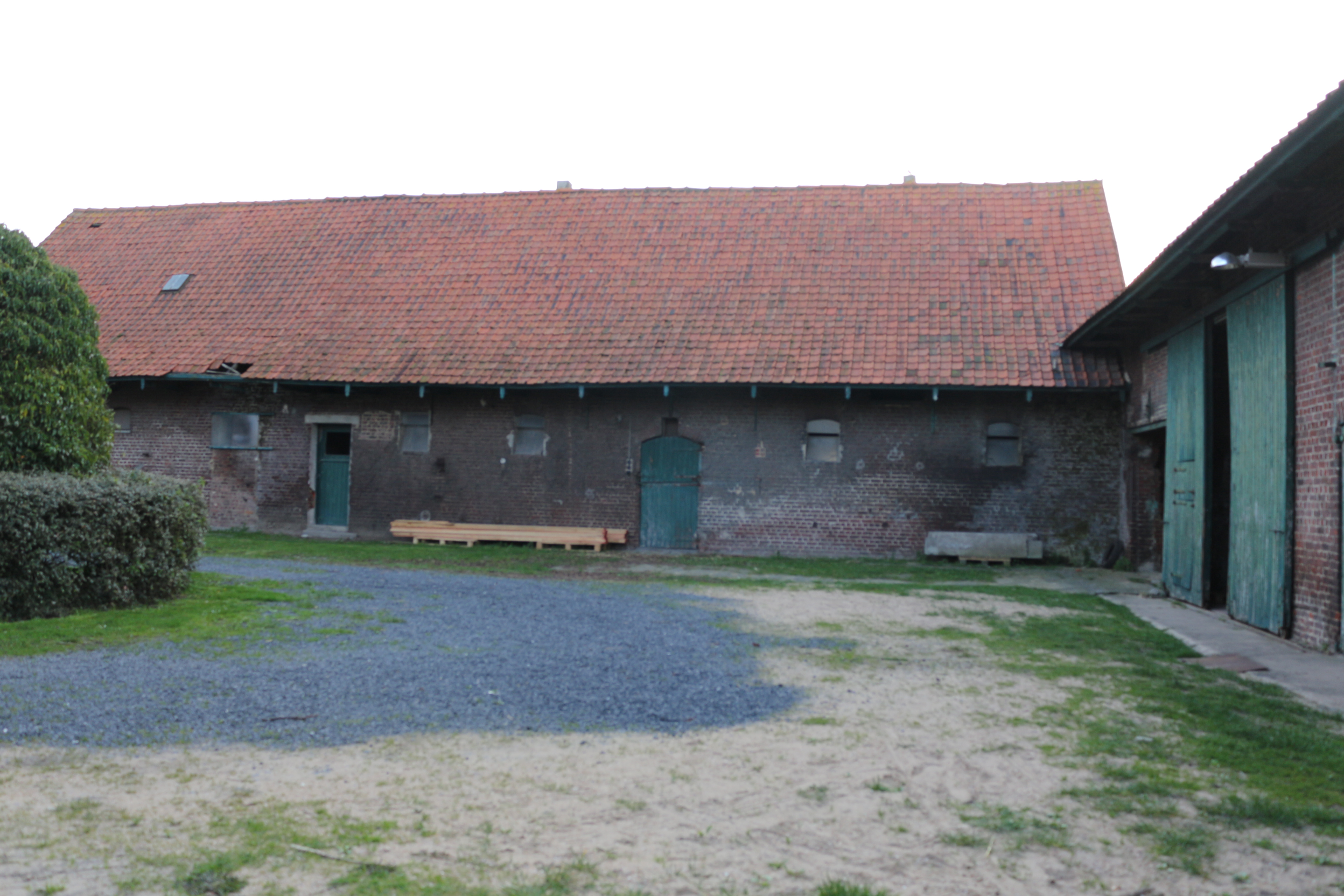 stalvleugel vanop de binnenkoer